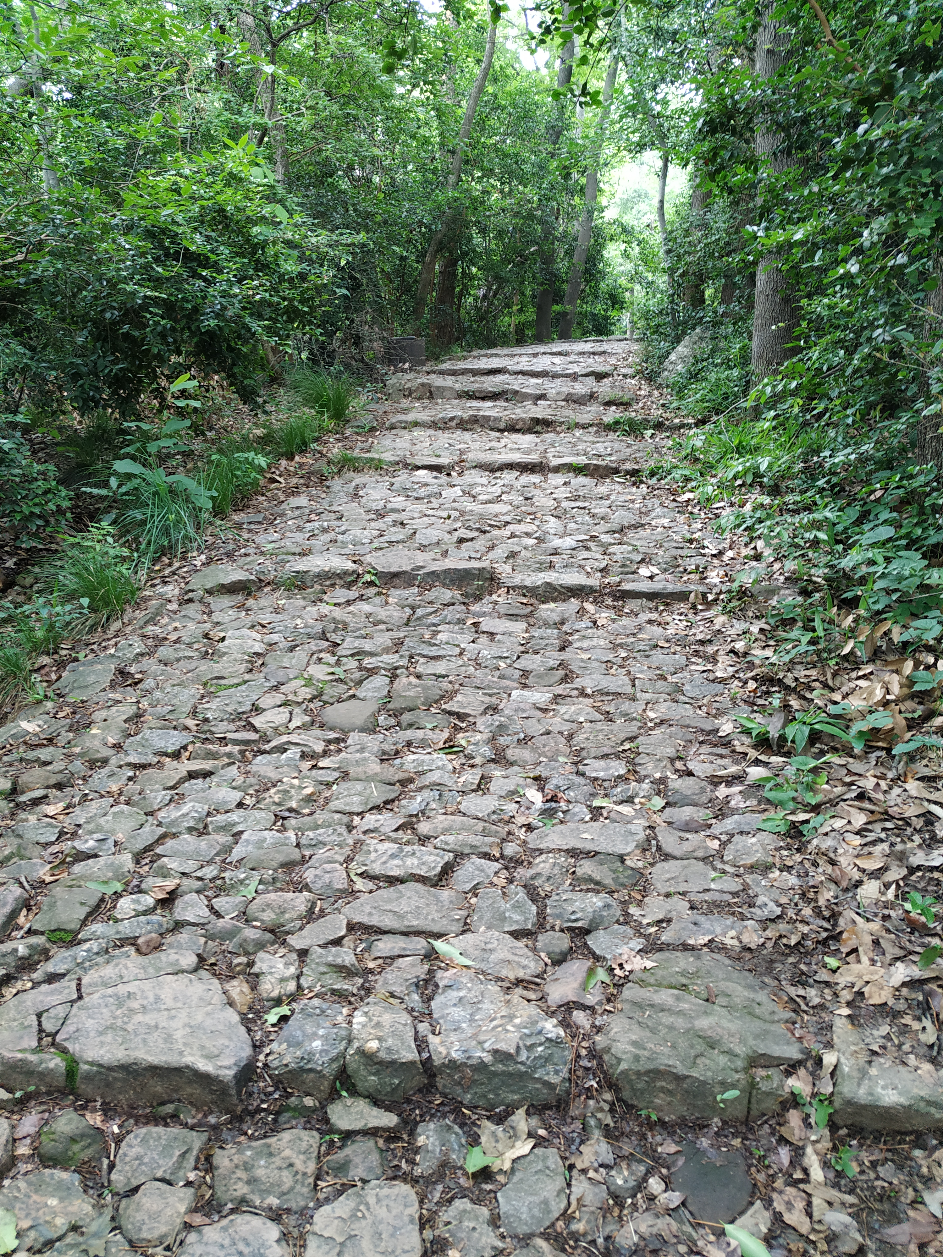 紫金山登山道